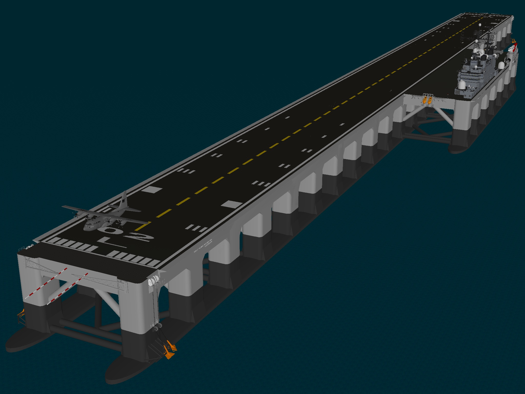 Floating runway military base